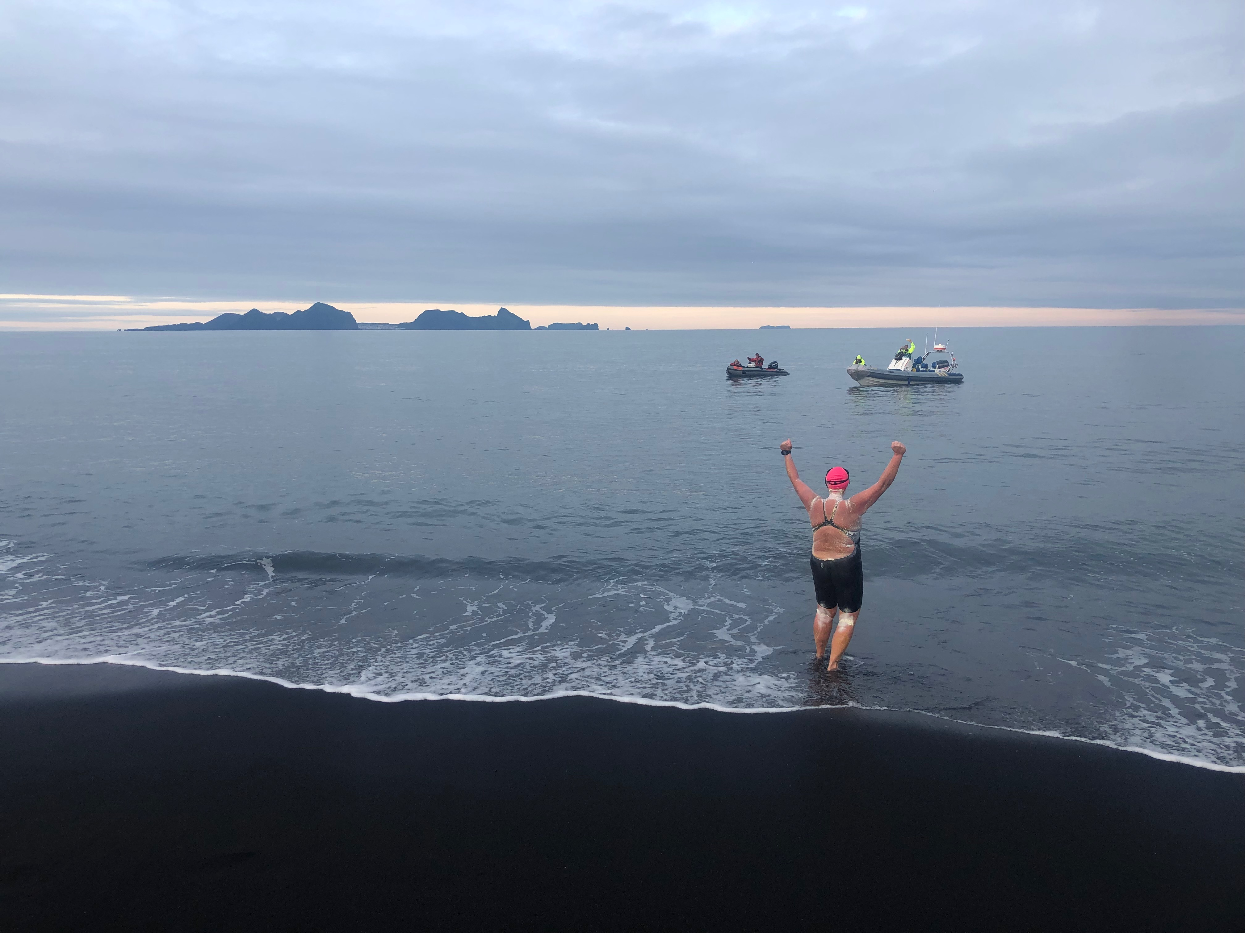 Eyjasundið - Sigrún kemur i land